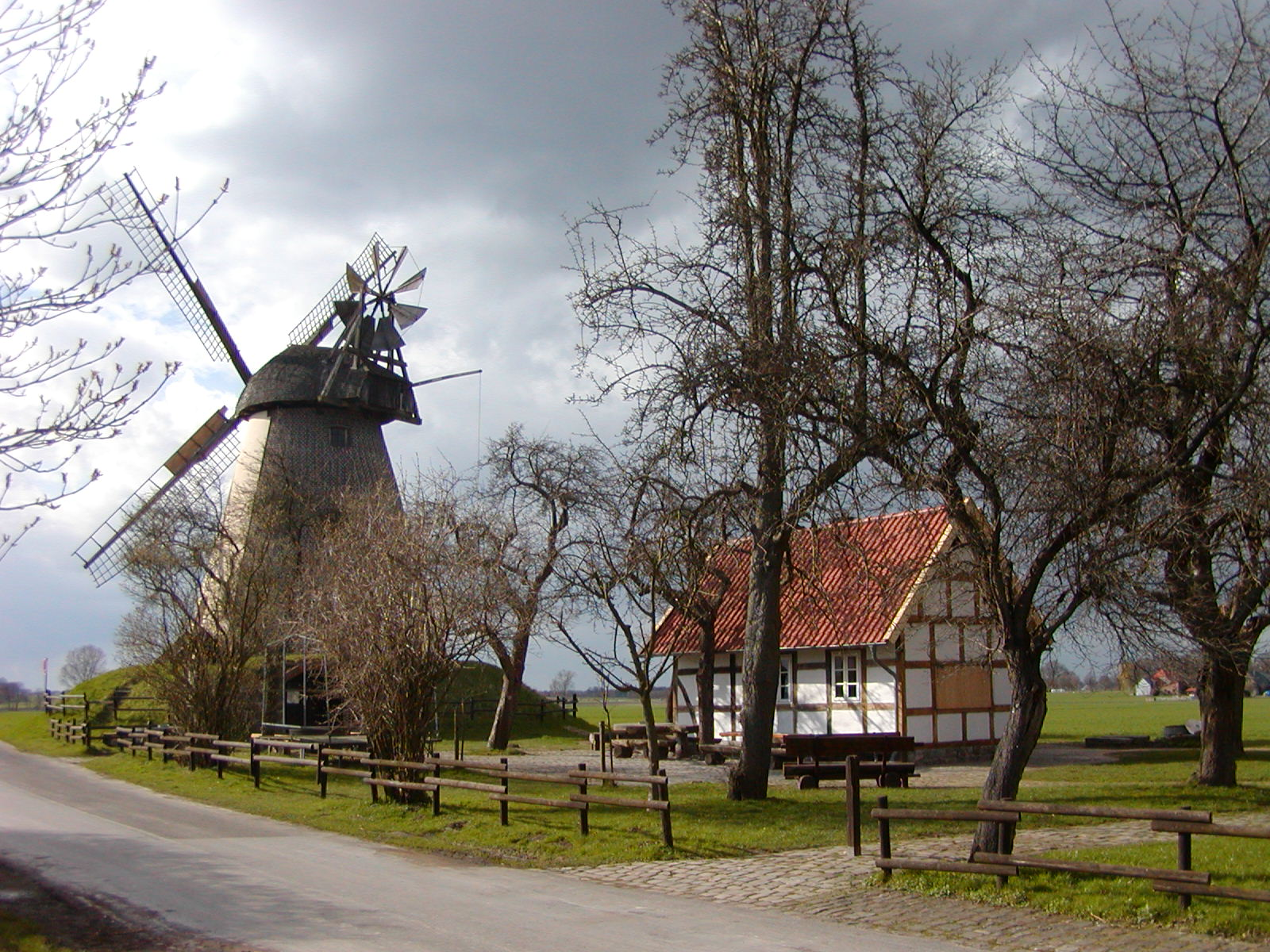 Windmühle Südhemmern Sonstiges